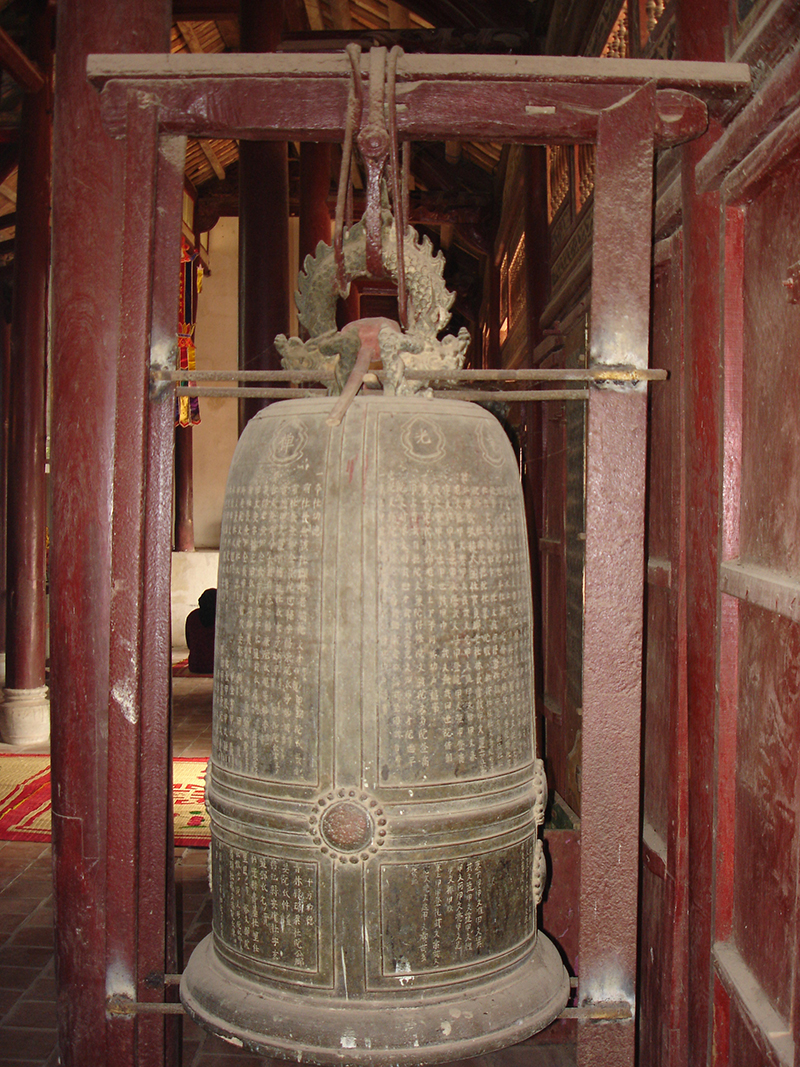 Chuông chùa Thiên Long Tự (chùa Thái Đào) được đúc từ thế kỷ thứ XVIII